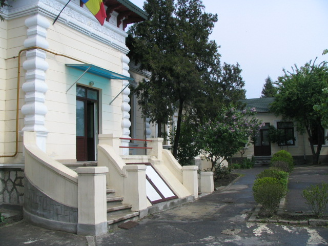 Biblioteca Municipală